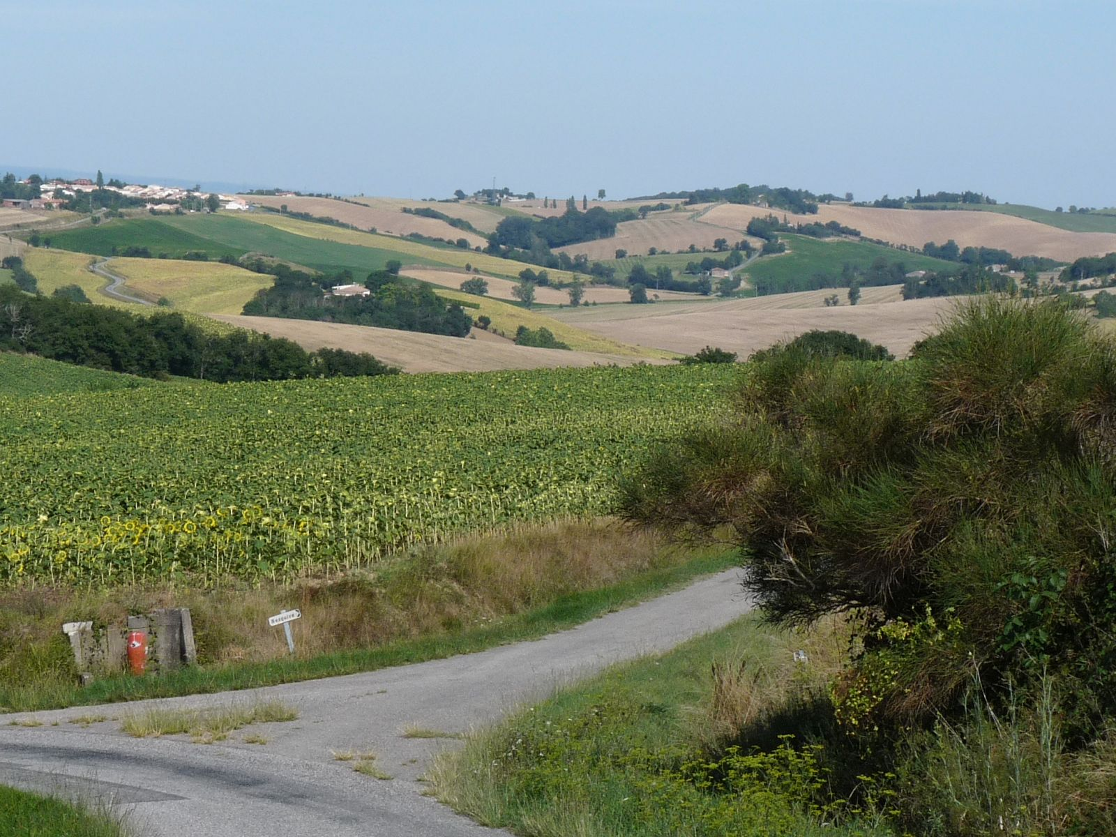 Sud de Lagarde vu de l'ouest, Haute-Garonne, France